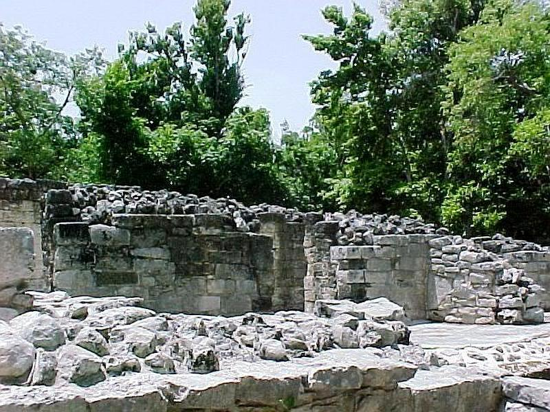 Zona Arqueológica de Xel-Ha